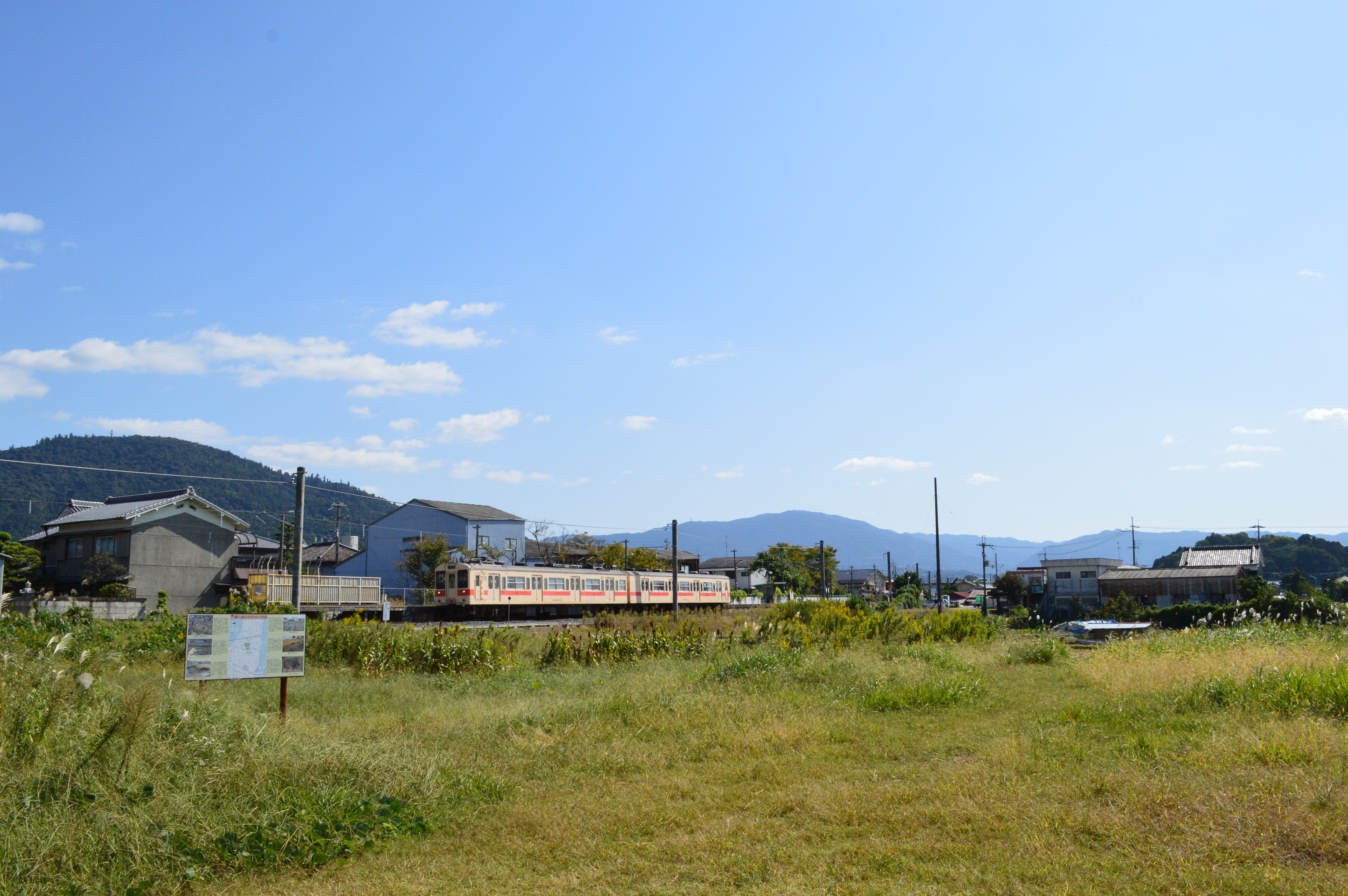 纒向遺跡 辻地区